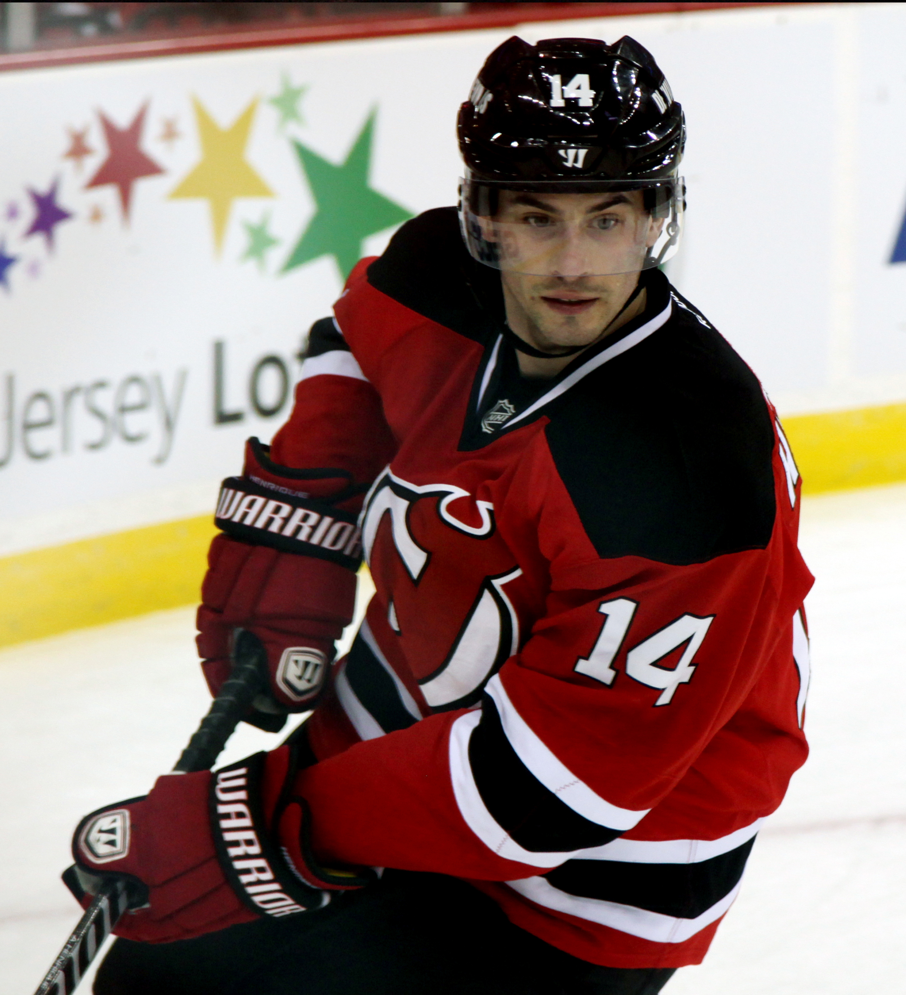 Henrique in 2013.